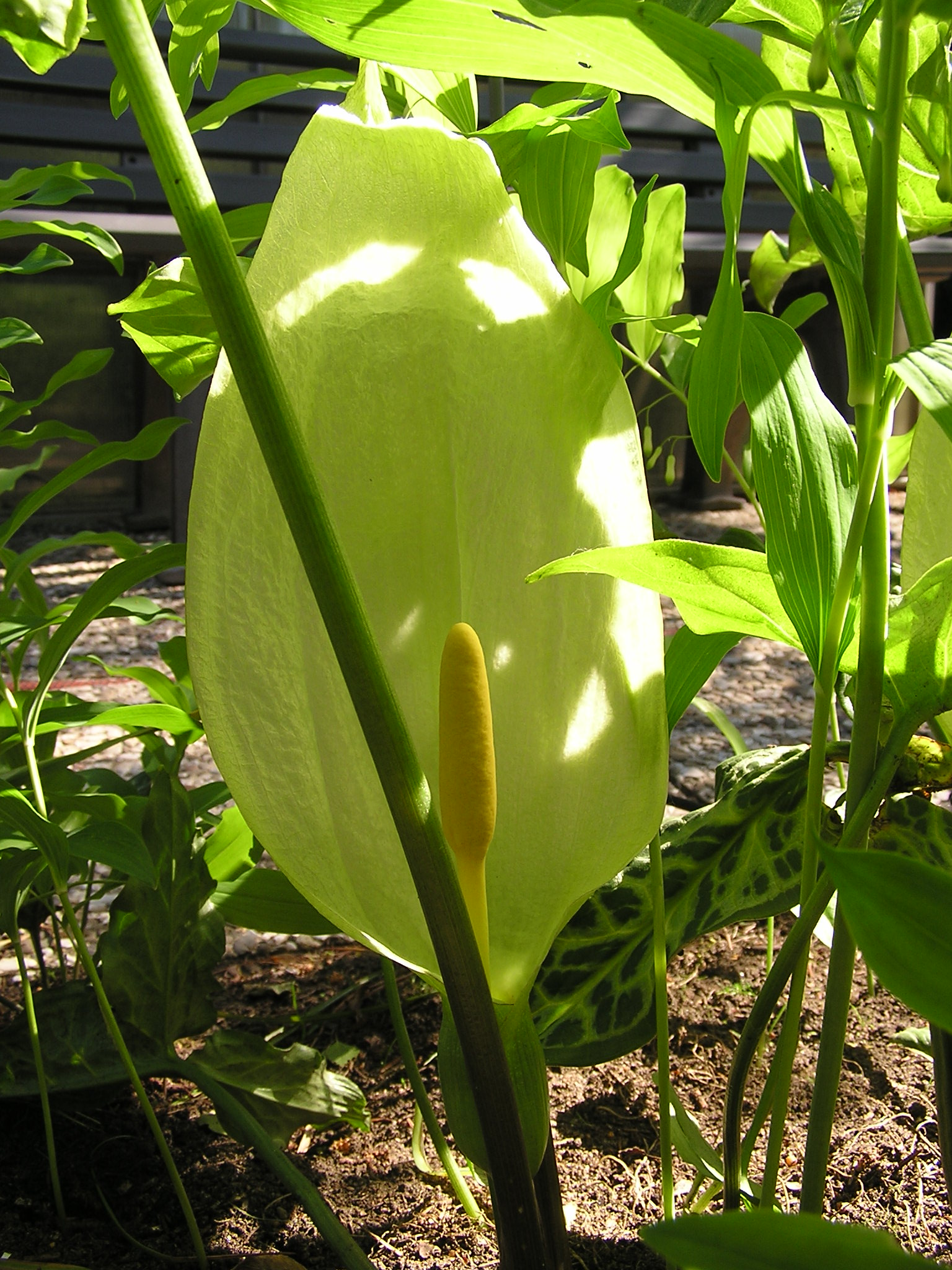 Aronstab Blüte (Arum italicum)